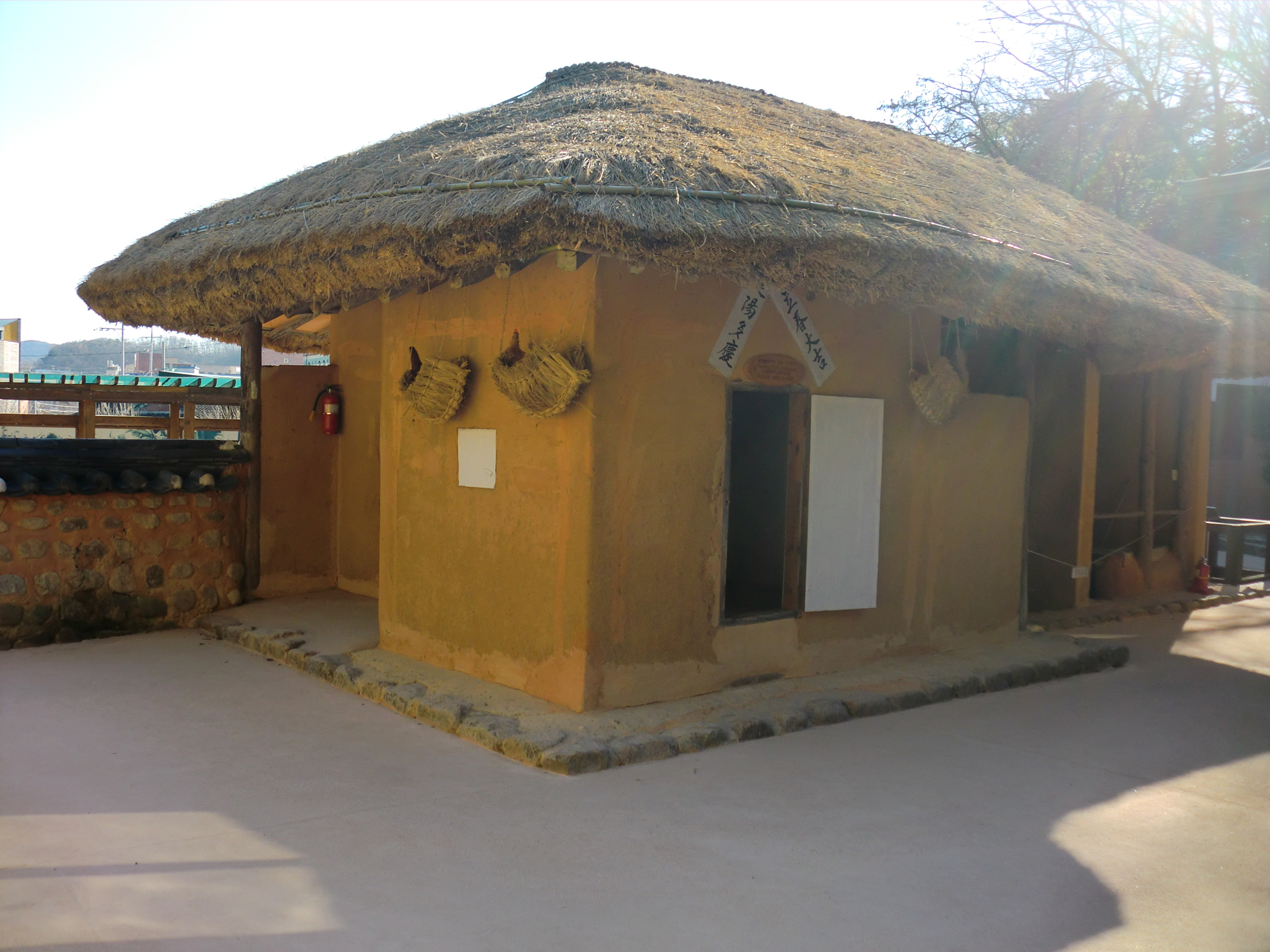 경상북도 구미시에 있는 박정희생가